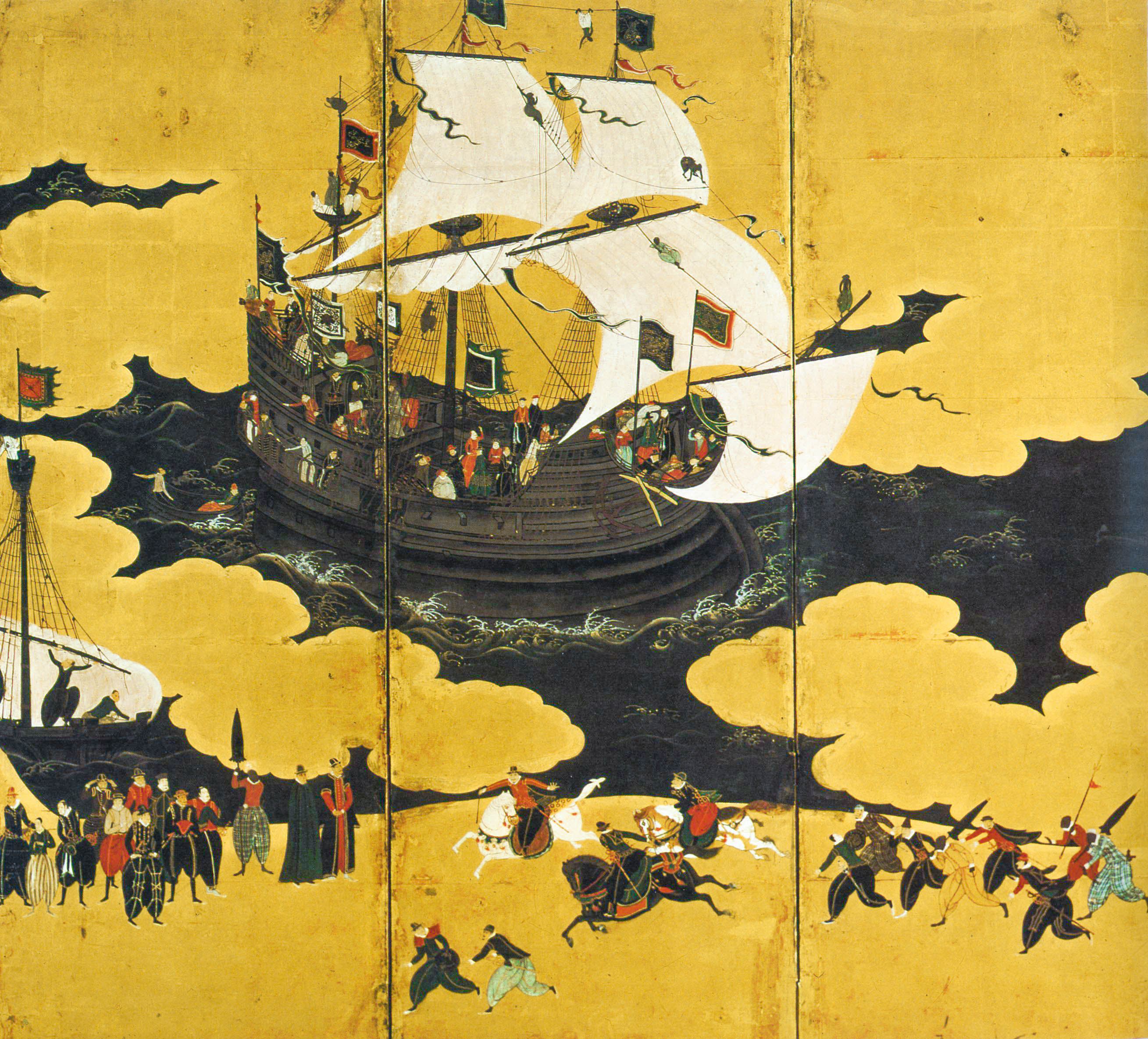 "Nanban" artpanels